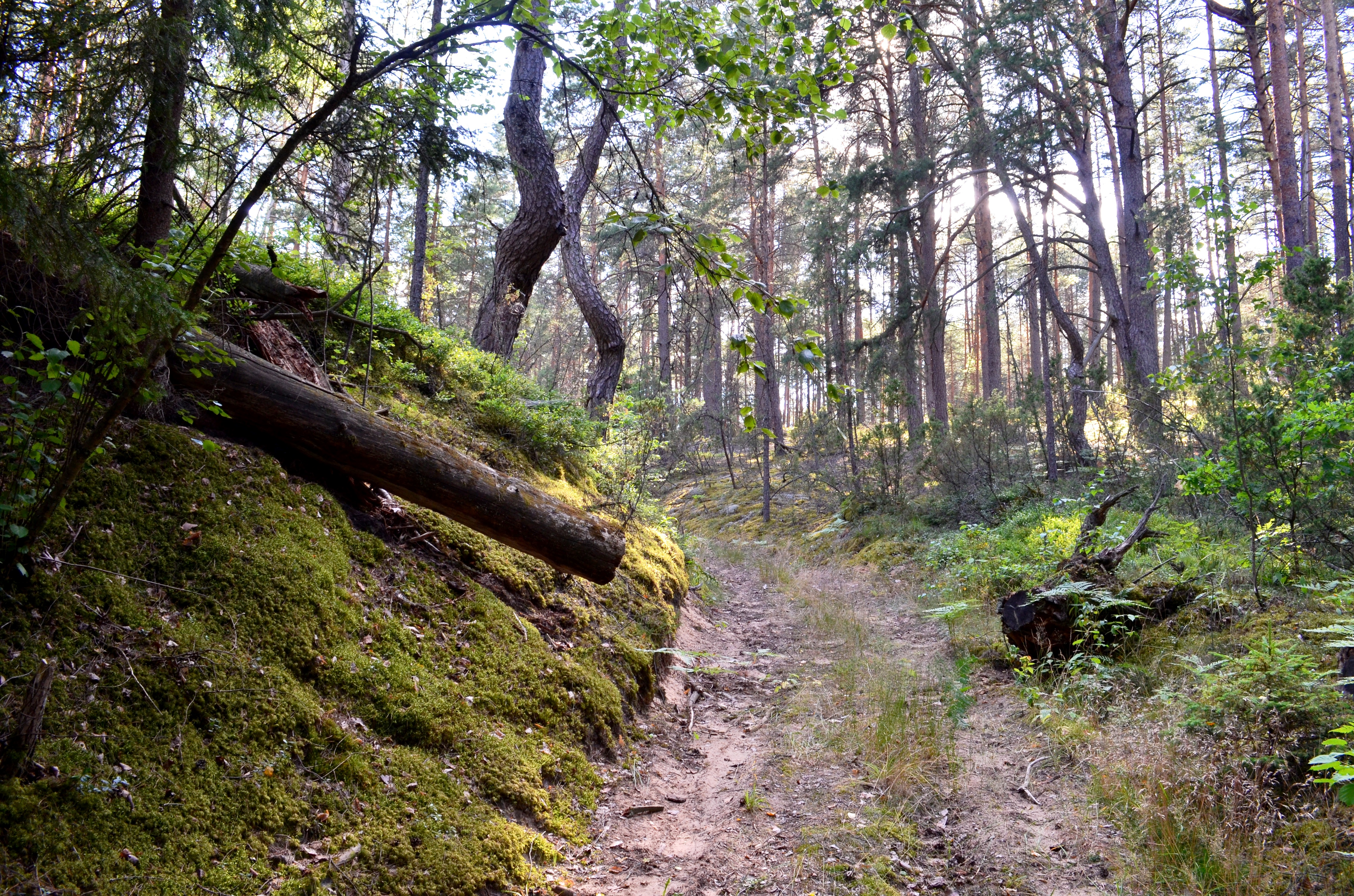 Šiaurinis kalvaragis, Rudnelė, Varėnos r.